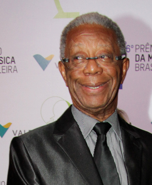 Milton Goncalves - 26° Prêmio da Música Brasileira 2015, no Theatro Municipal, no Centro do Rio de Janeiro/RJ. (10/06/15) Foto: Roberto Valverde/Divulgacão